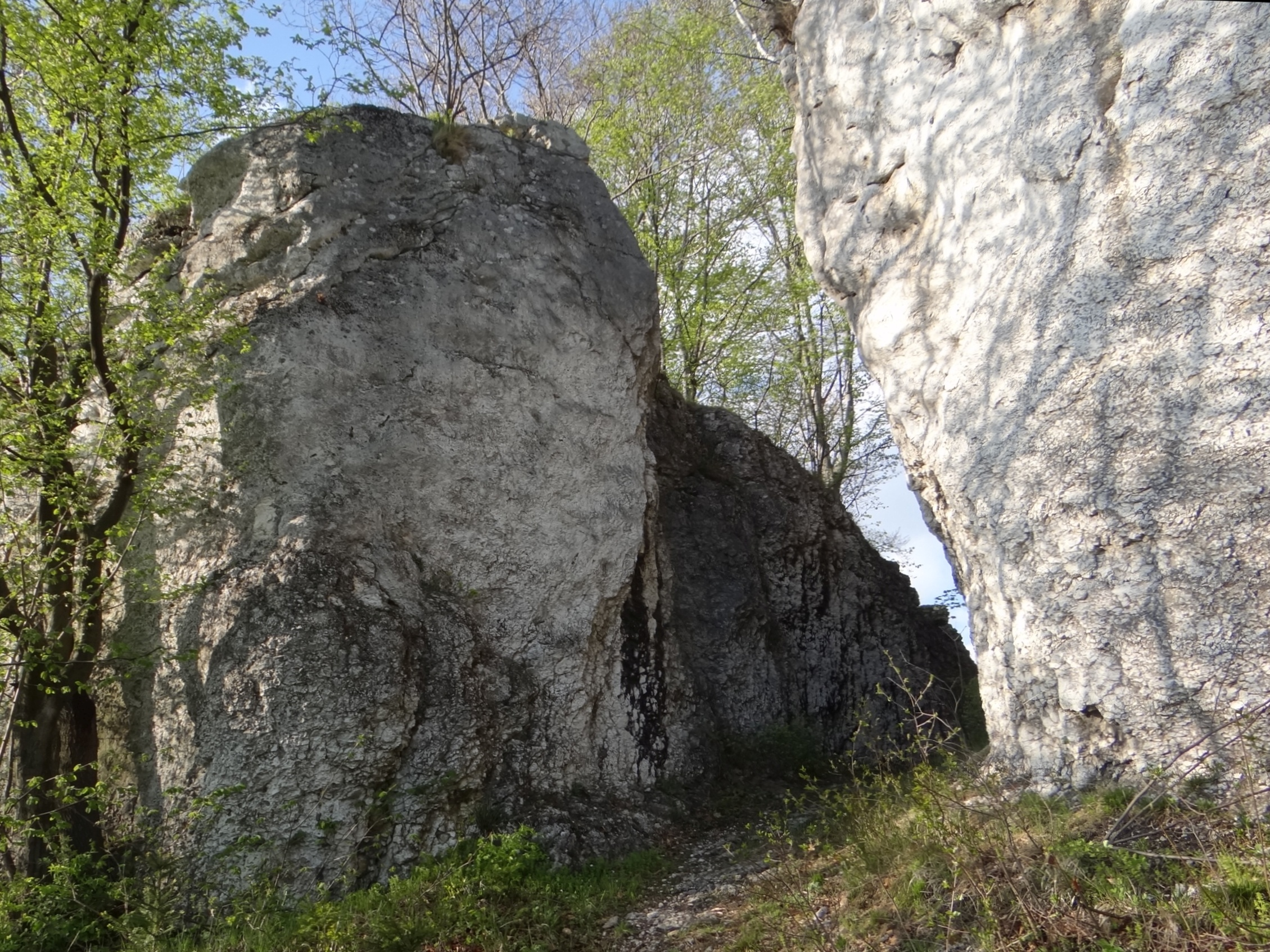 Skała Brama w grupie Rogożowej Skały w miejscowości Przeginia na Wyżynie Olkuskiej